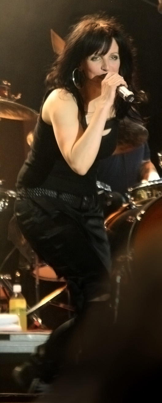 Nena